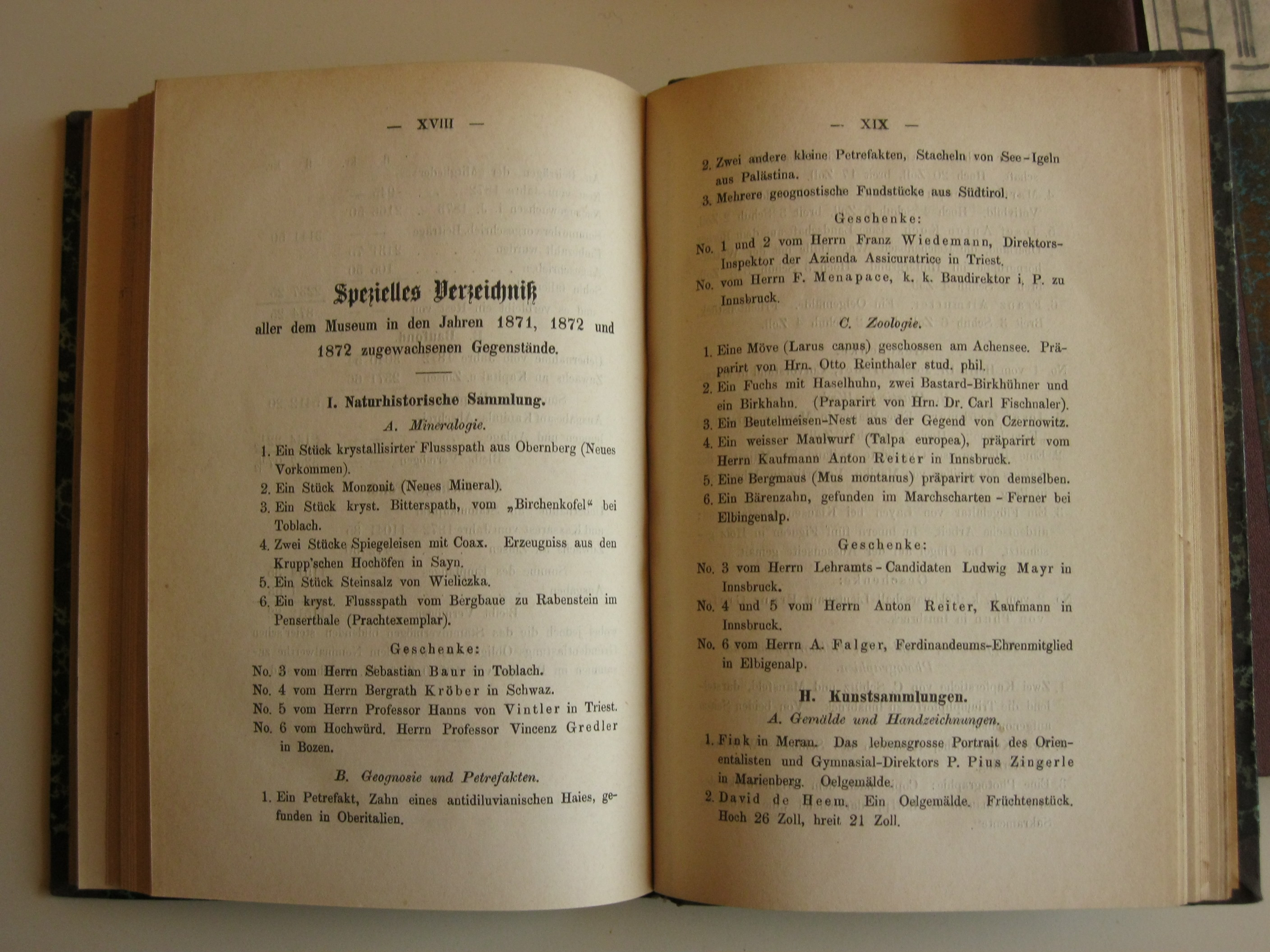 Zeitschrift des Ferdinandeums für Tirol und Vorarlberg 1873